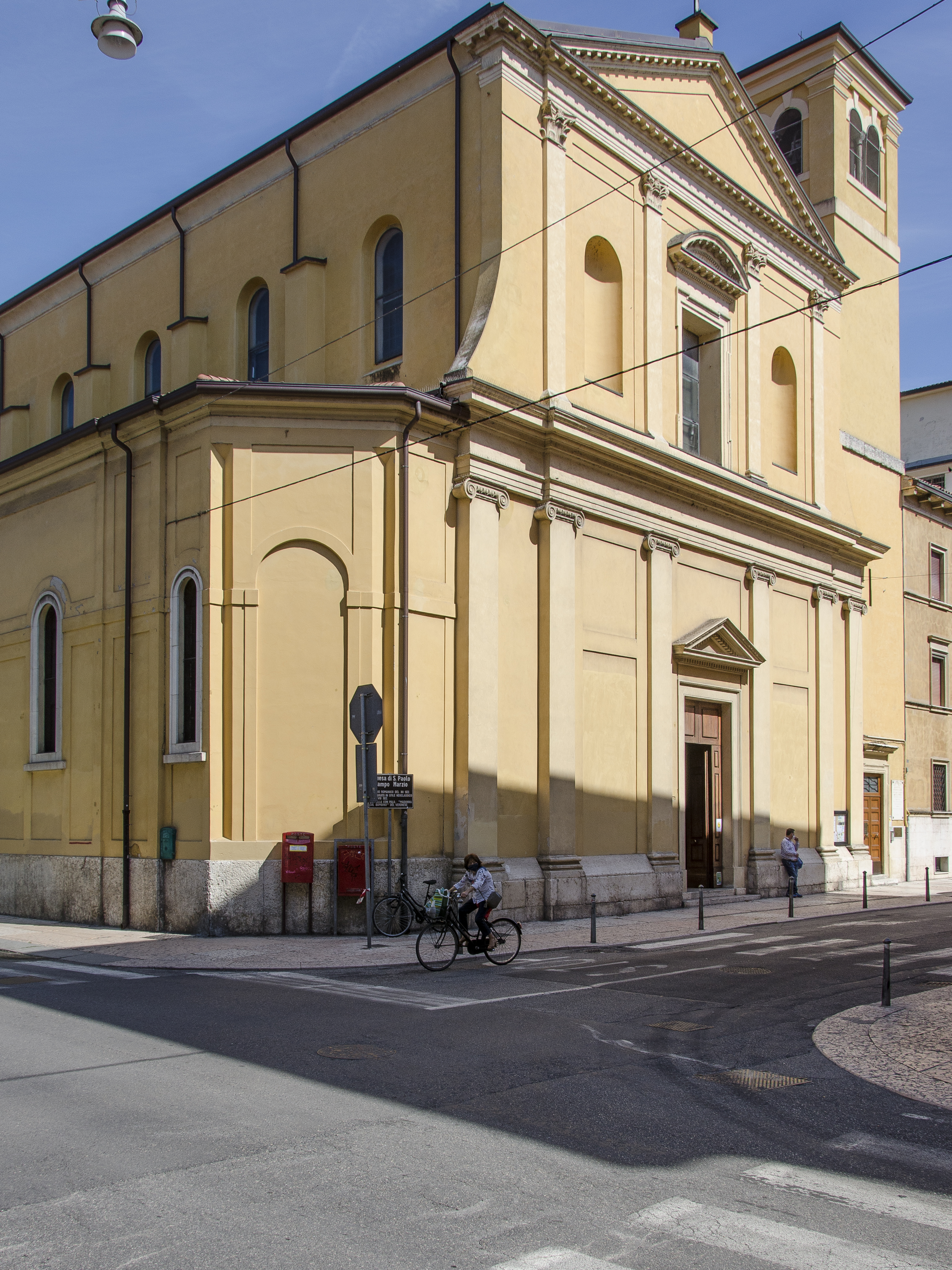 Chiesa di San Paolo a Verona, esterno